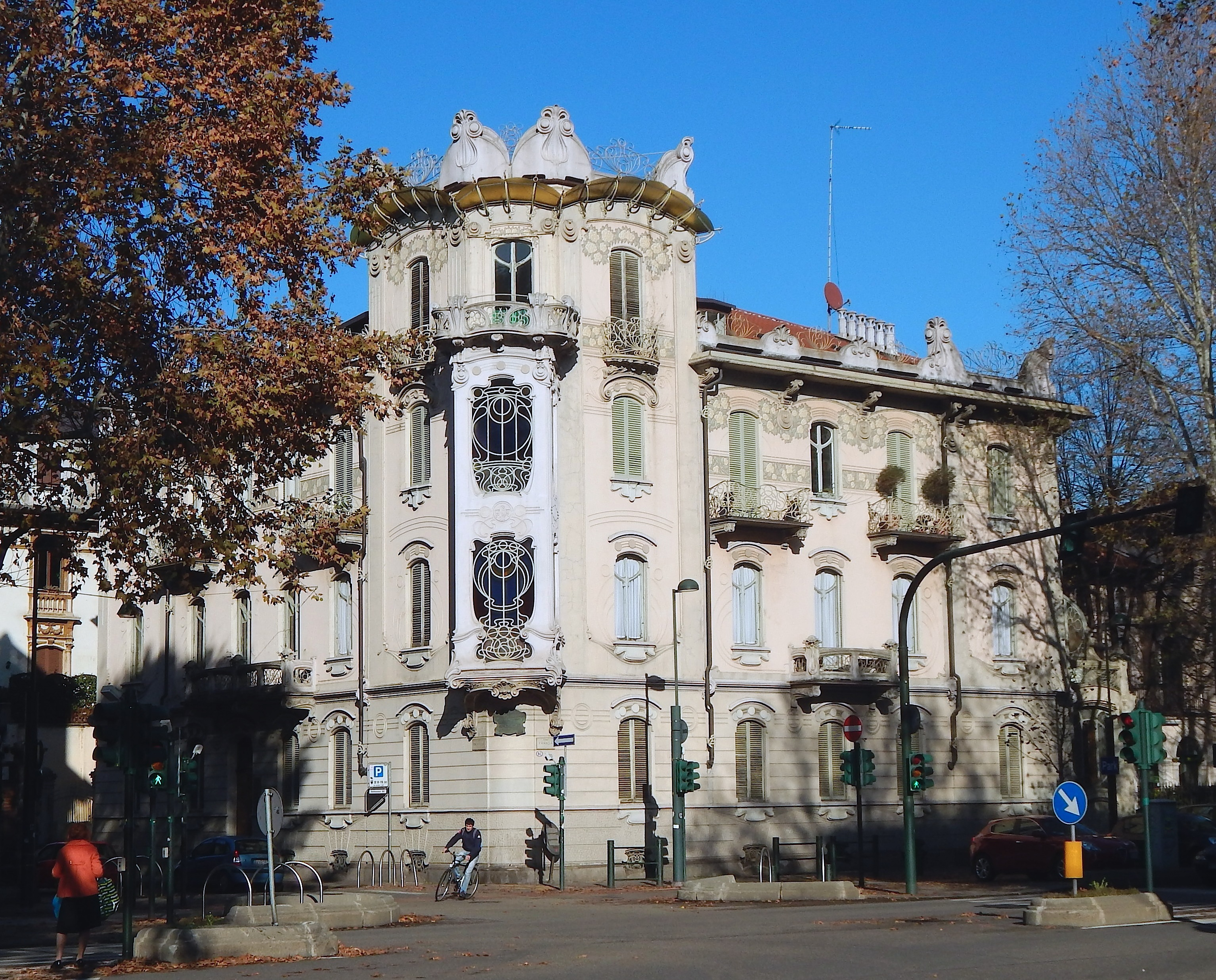 Veduta della Casa Fenoglio